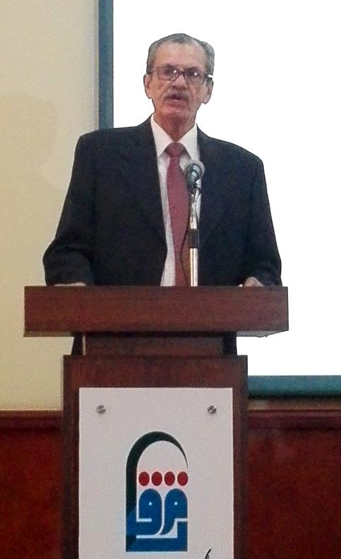 .ألثيبياديس جونثالث دل بايي